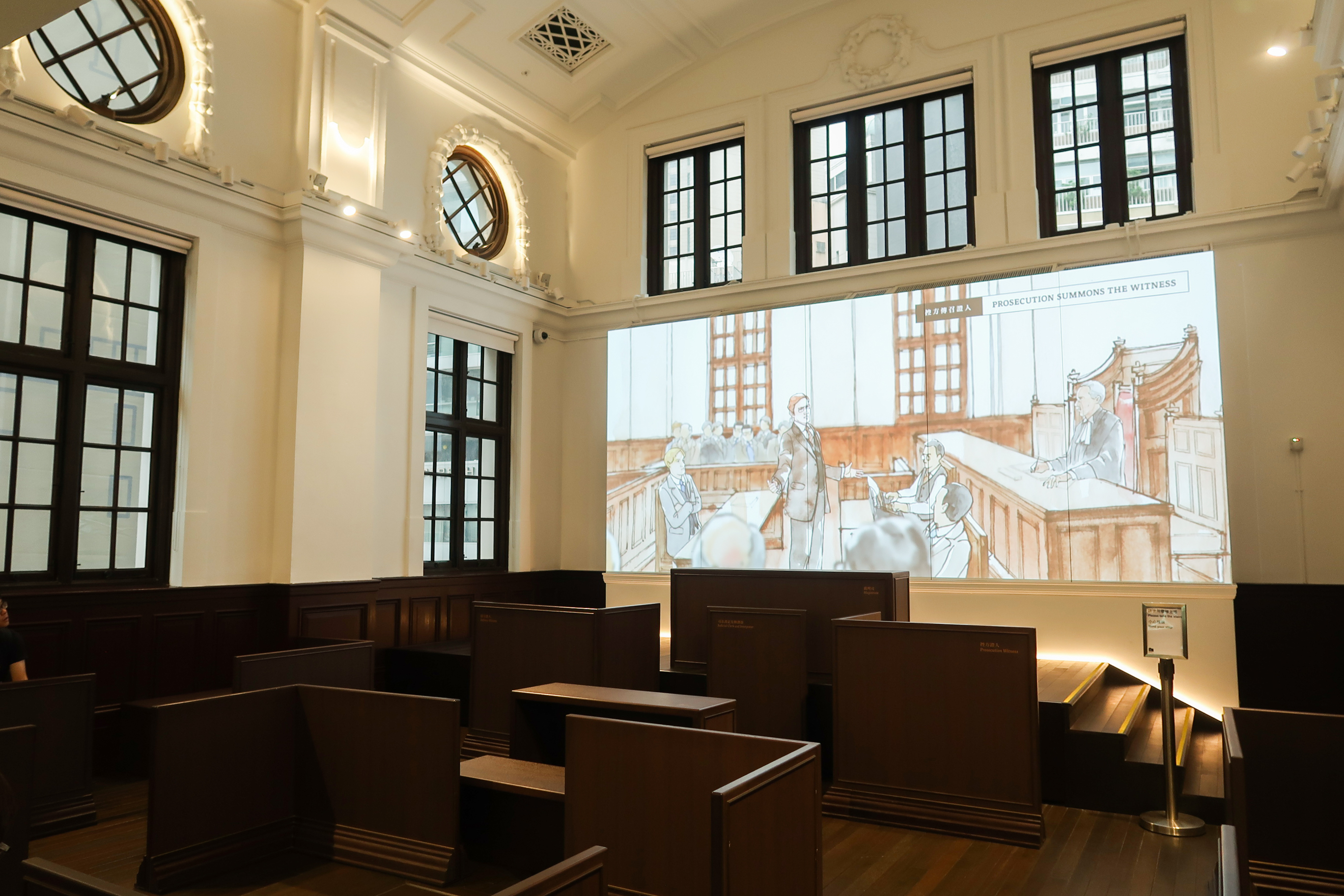 Tai Kwun Central Magistracy